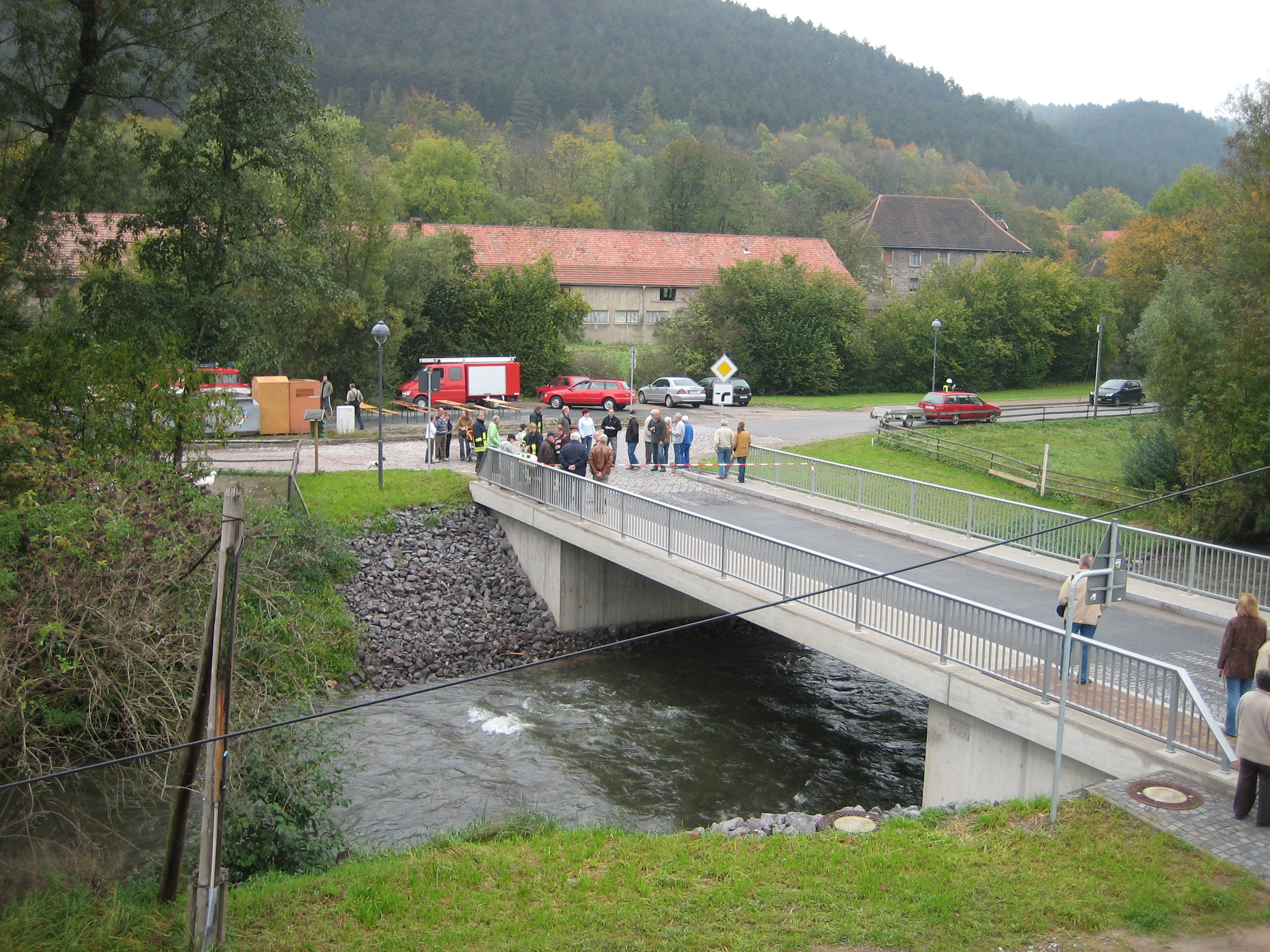 Einweihung der Brücke über die Gera am 03.10.2007